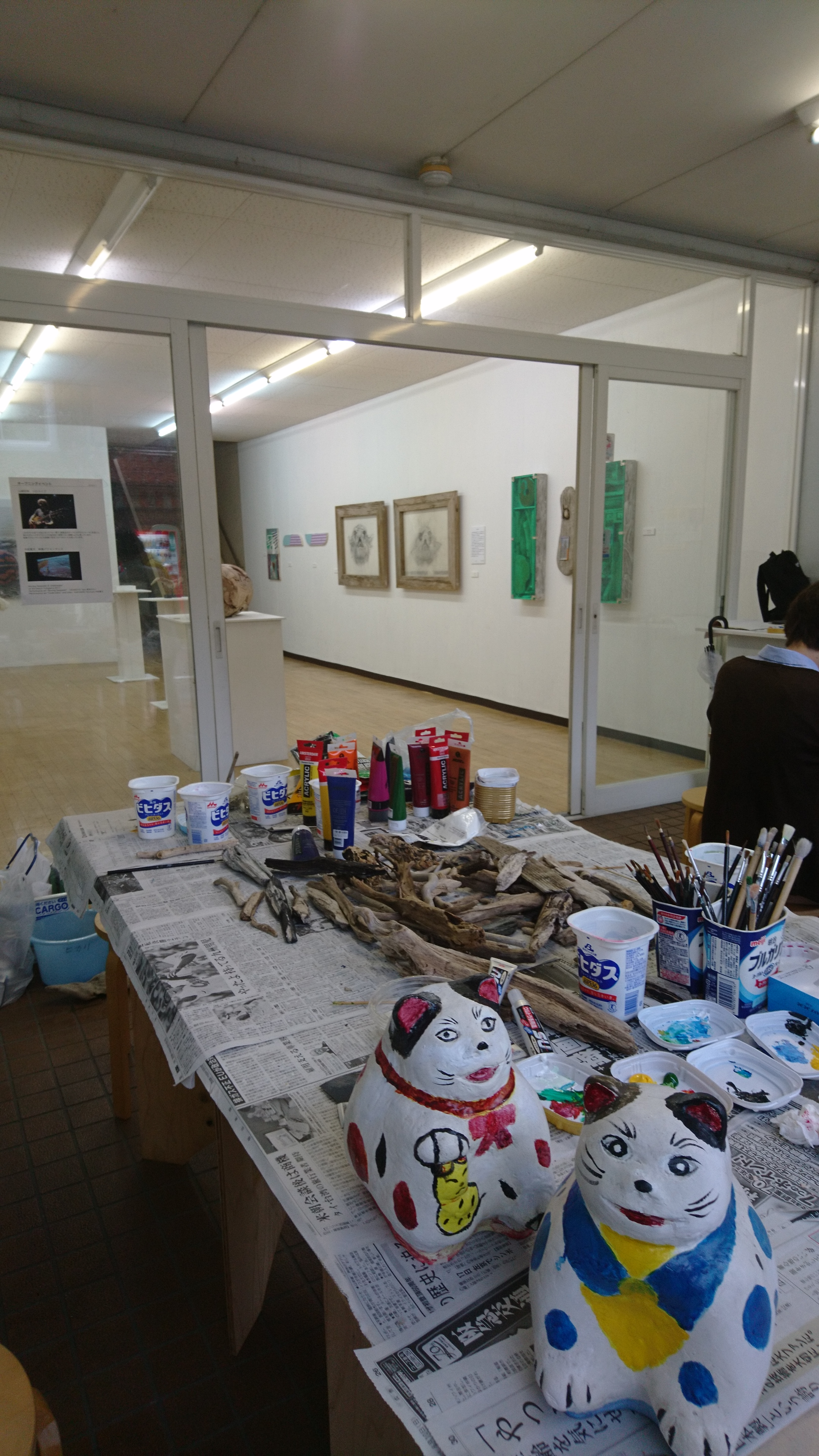 こまねこまつりワークショップ（田中家具店）